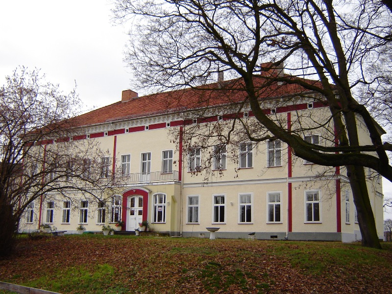 Gutshaus Parchen, Sachsen-Anhalt, Südansicht